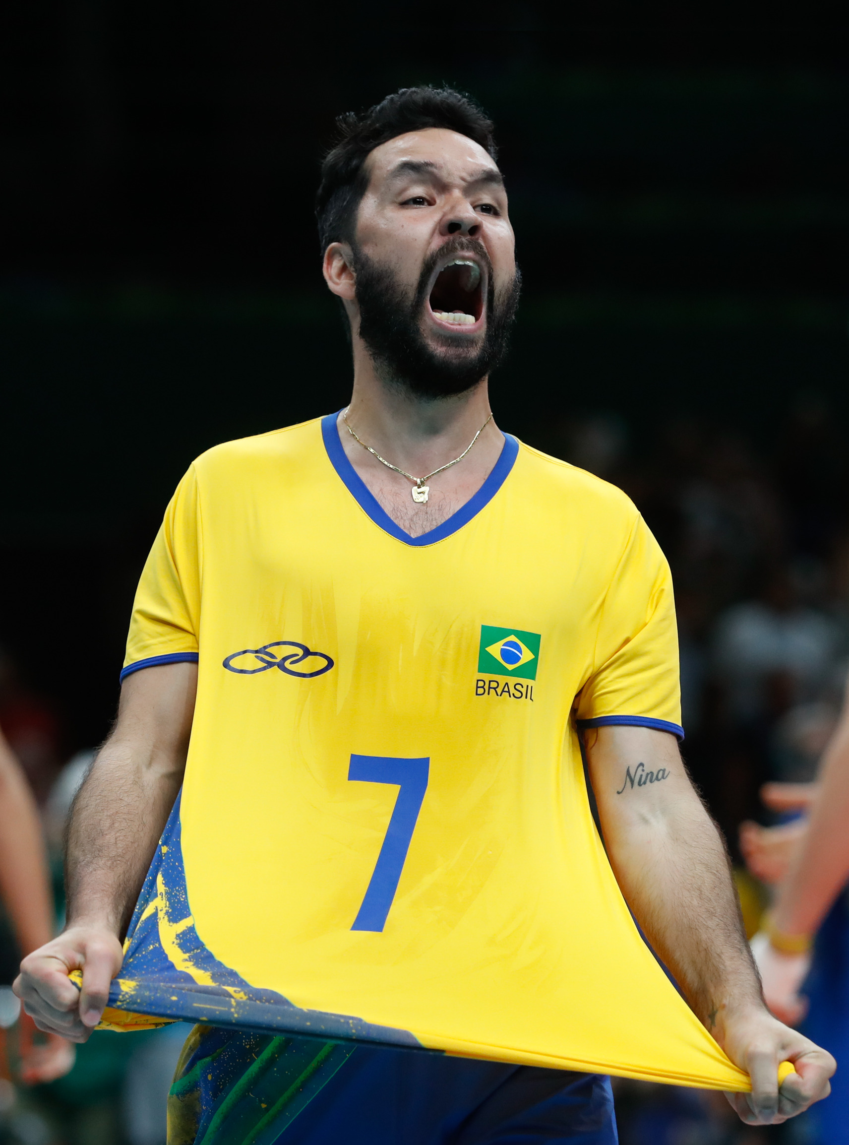 Rio de Janeiro - Seleção brasileira masculina de vôlei vence a da França por 3 sets a 1 no Maracanãzinho e vai às quartas-de-final (Fernando Frazão/Agência Brasil)